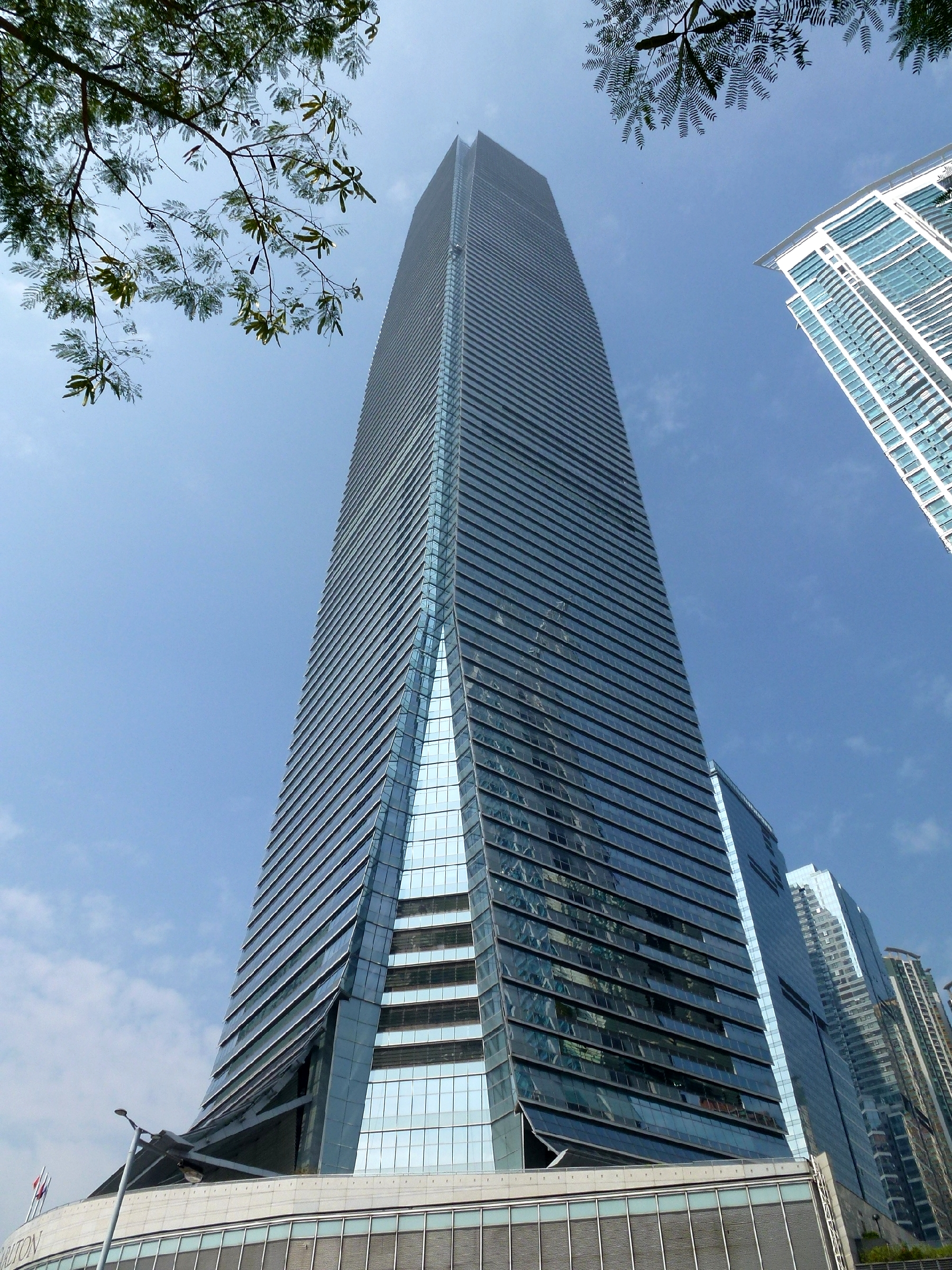 I.C.C. 484m 118F Kowloon Hong Kong